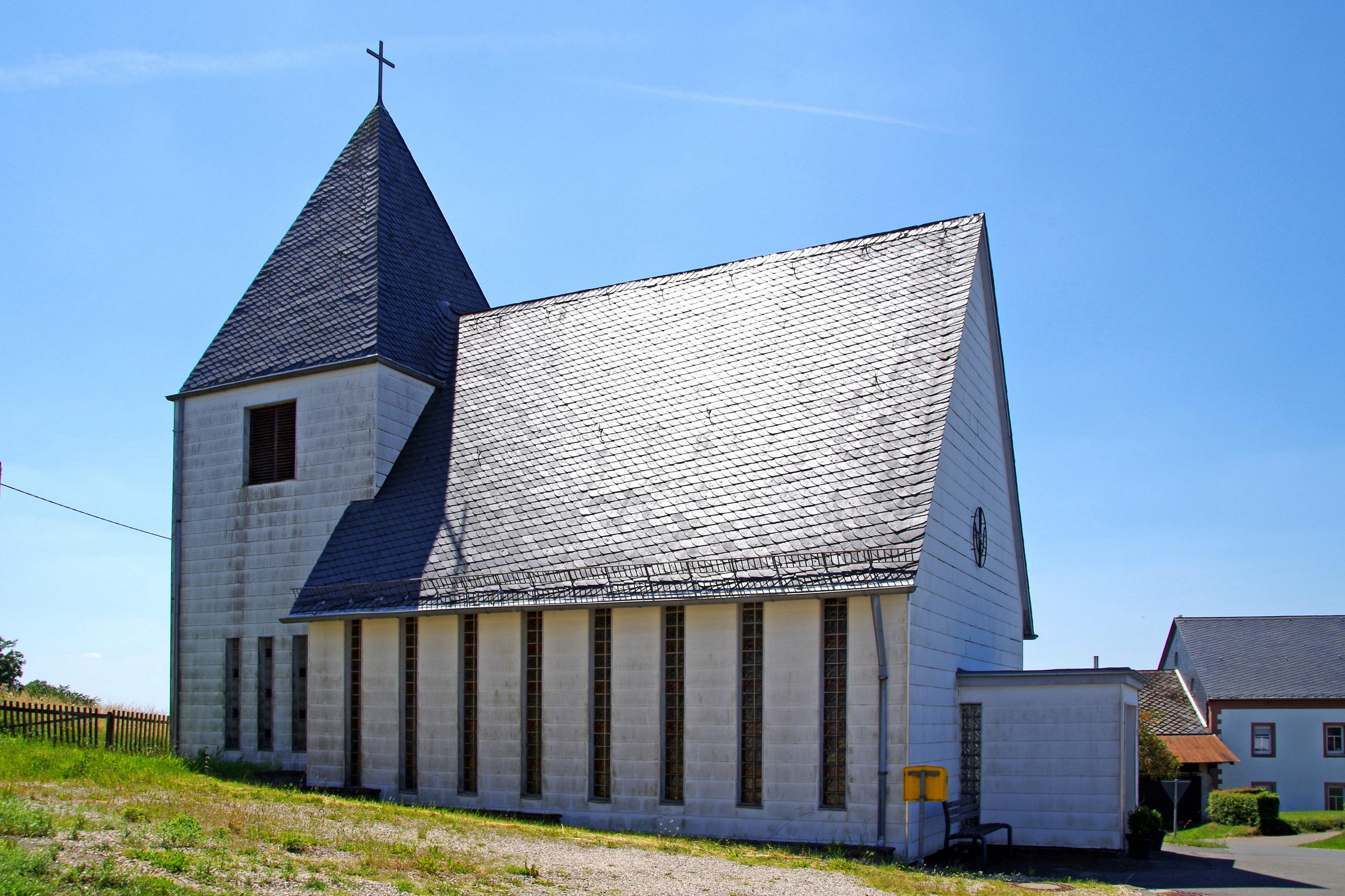 St. Jakobus der Ältere (Scheuern), Nordseite